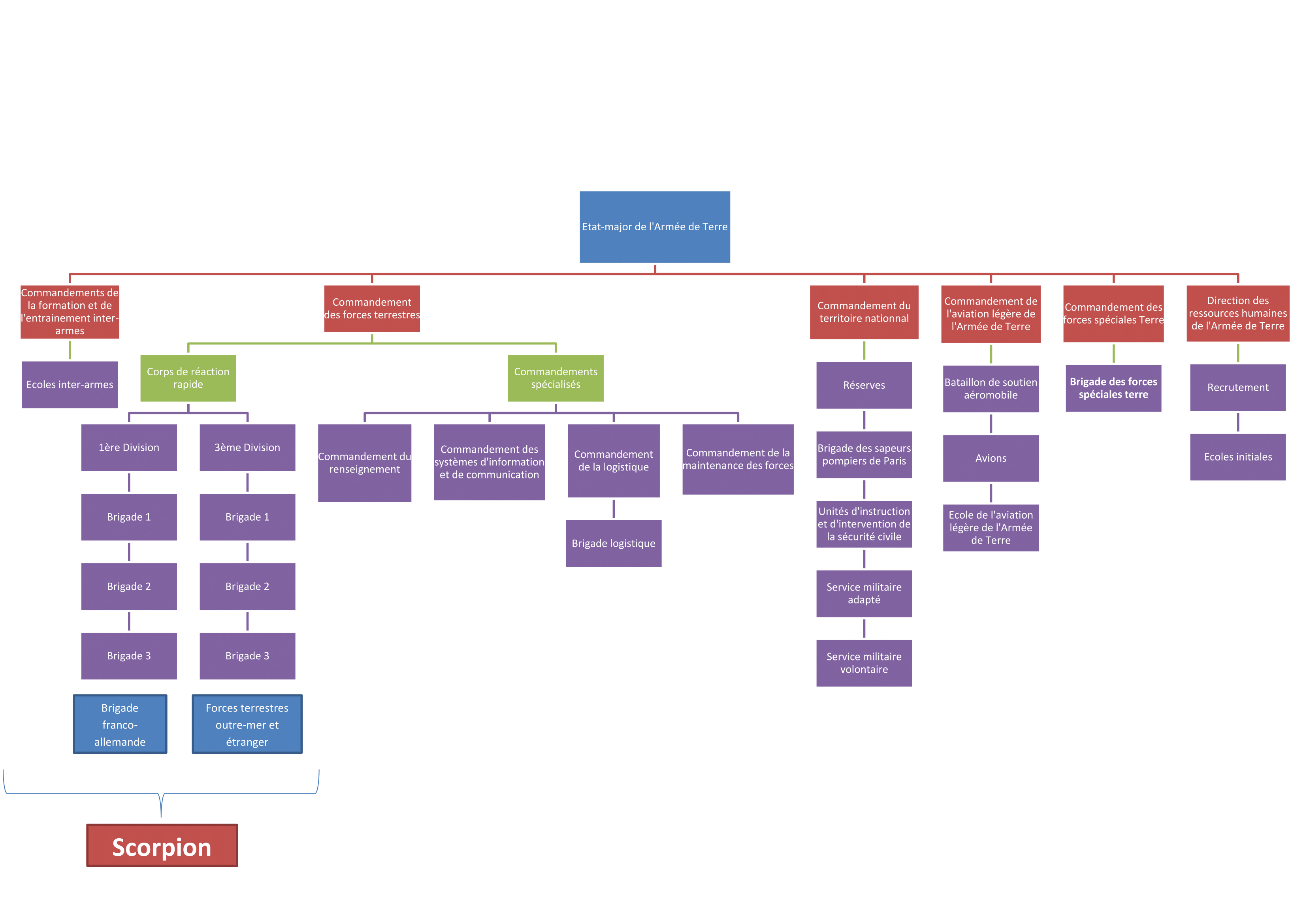 Organisation de l'Armée de terre française selon le plan Au contact présenté en mai 2015.